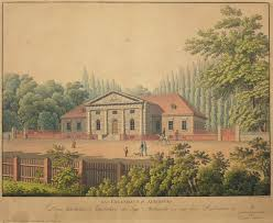 Kolorierter Stahlstich von ca. 1840